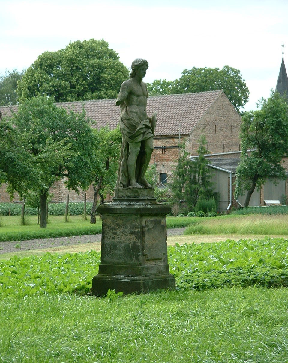 Alte Skulptur im Garten auf dem ehemaligen Schlossparkgelände Kerzendorf in Ludwigsfelde